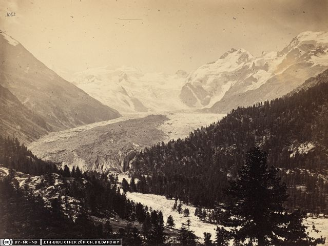 Der Morteratschgletscher, aufgenommen 1867 von Adolphe Braun. Aus dem Bildarchiv der ETH-Bibliothek Zürich.